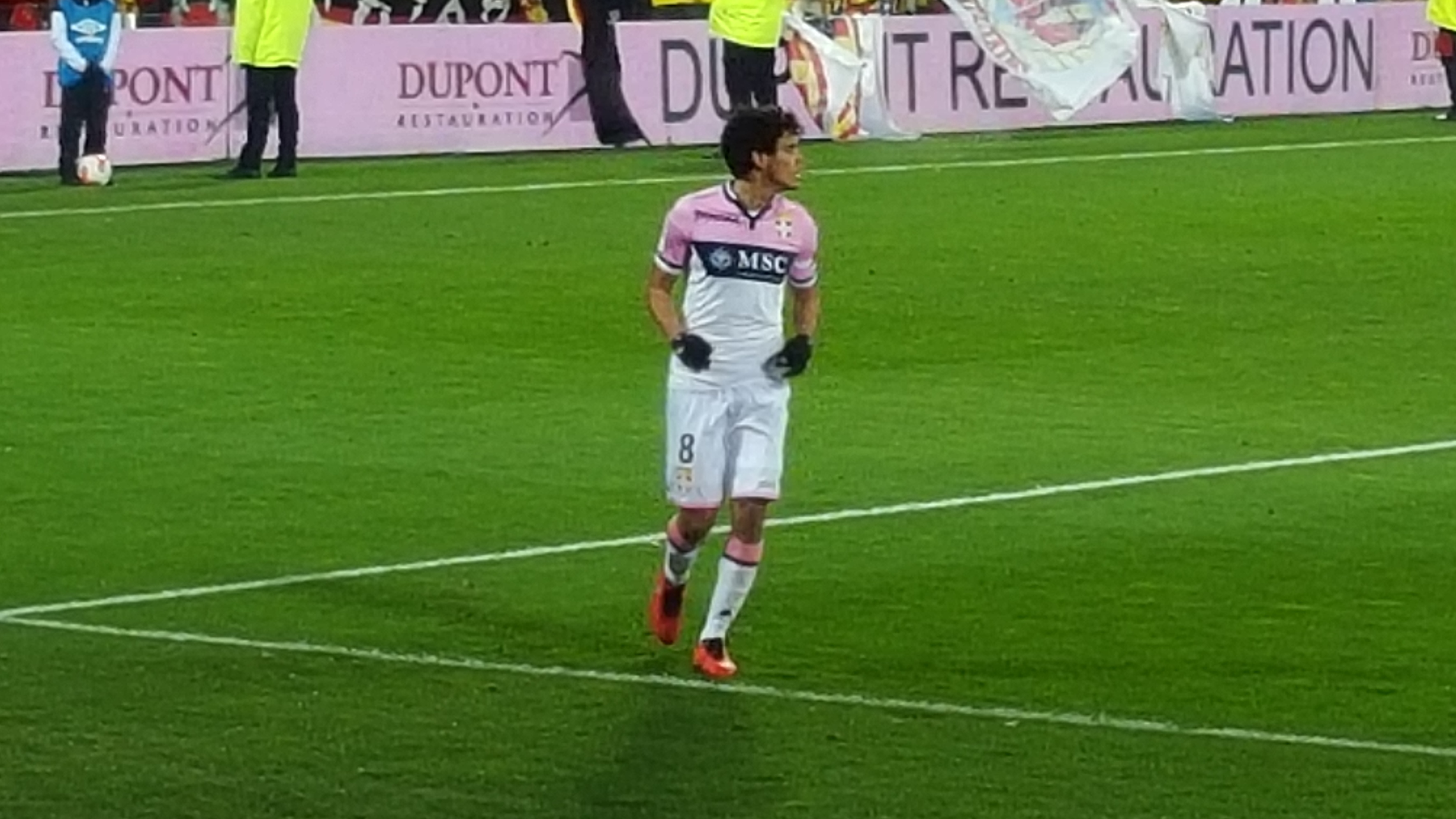 Yeltsin Tejeda lors du match RC Lens / Evian TG, comptant pour la vingt-huitième journée du Championnat de France de football de Ligue 2, le 29 février 2016, au Stade Bollaert Delelis